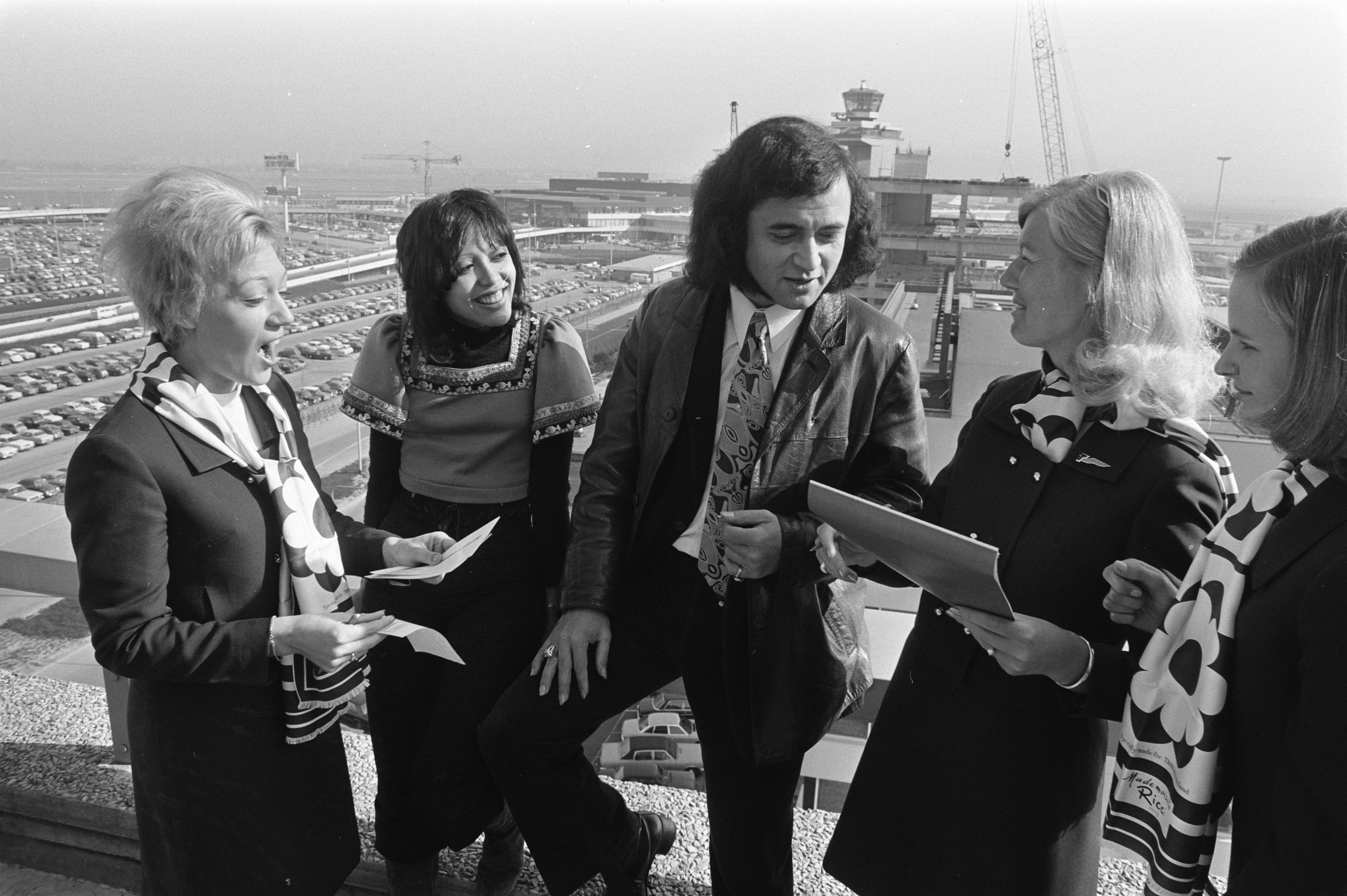 Collectie / Archief : Fotocollectie Anefo Reportage / Serie : [ onbekend ] Beschrijving : Sandra en Andres vertrekken van Schiphol naar Eurovisie Songfestival in Edinburgh Datum : 22 maart 1972 Locatie : Noord-Holland, Schiphol Trefwoorden : songfestivals Persoonsnaam : Andres Instellingsnaam : Eurovisie Song Festival Fotograaf : Verhoeff, Bert / Anefo Auteursrechthebbende : Nationaal Archief Materiaalsoort : Negatief (zwart/wit) Nummer archiefinventaris : bekijk toegang 2.24.01.05 Bestanddeelnummer : 925-4775